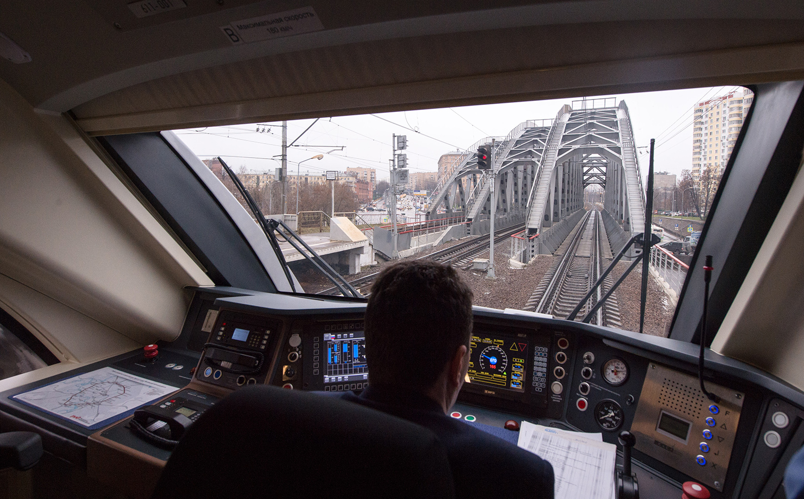 Вид из кабины автомотрисы Pesa 611M. Павелецкое направление, платформа "Зил", идёт на юг